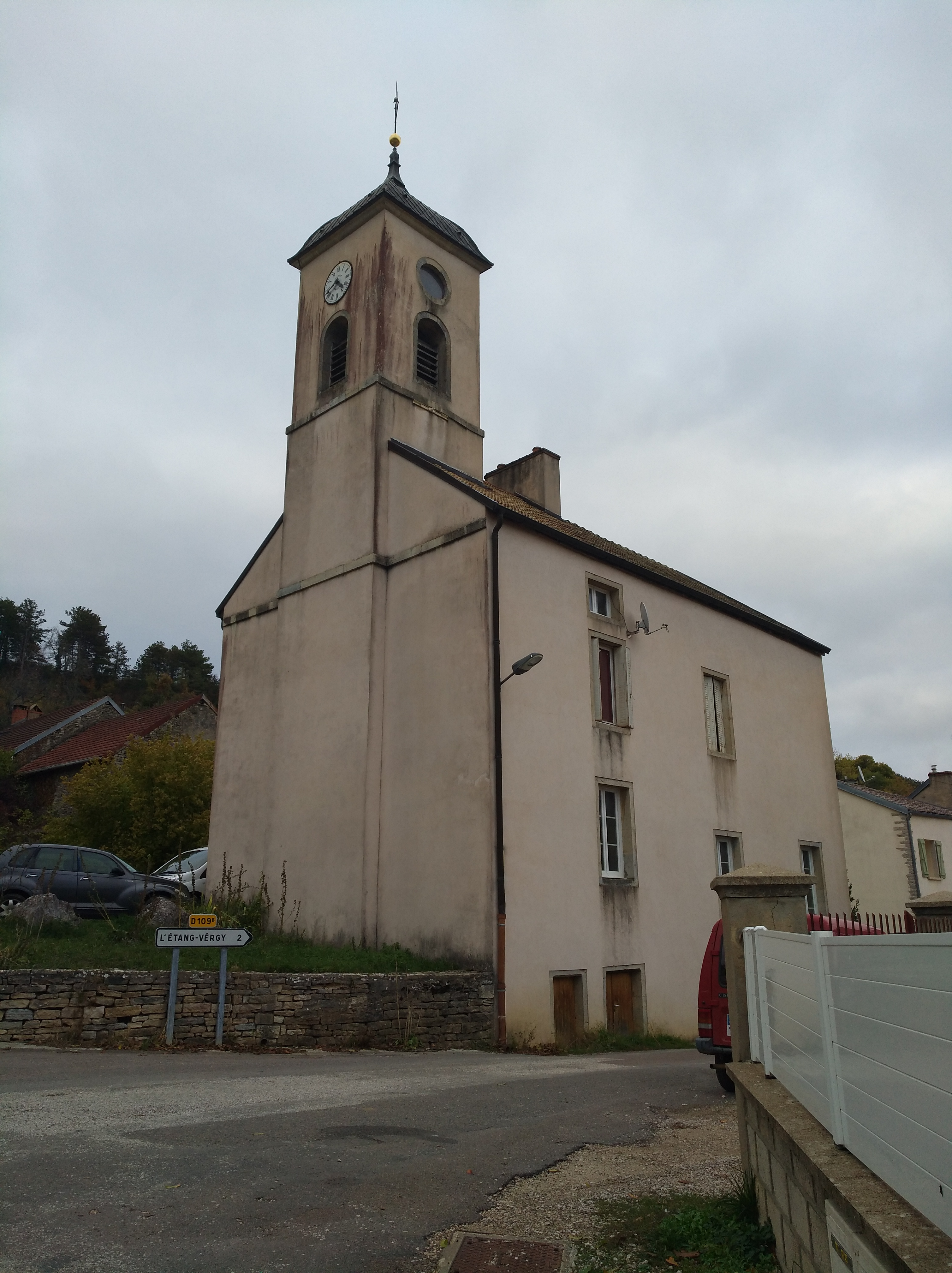 Salle de la Mutualité et son beffroi, à Bévy (Côte-d'Or, France).